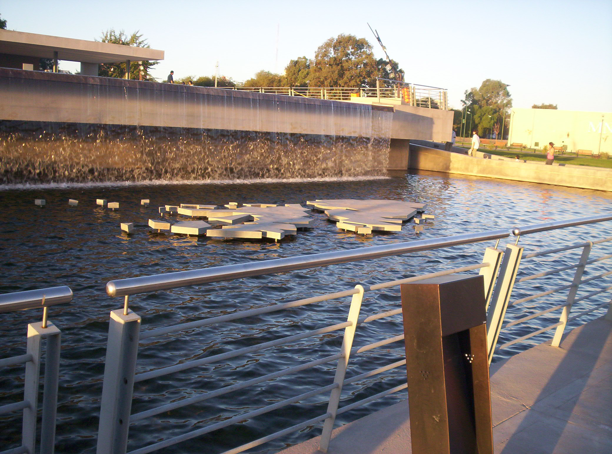 Imagen del Monumento a los caidos en la guerra de Malvinas ubicado en la ciudad de Neuquen